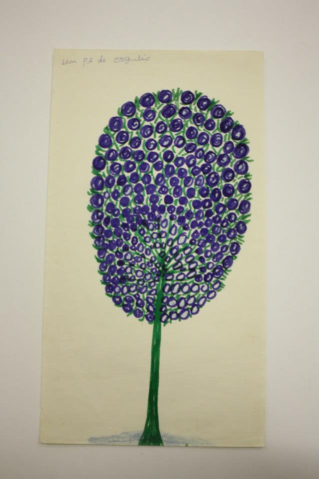 Desenho